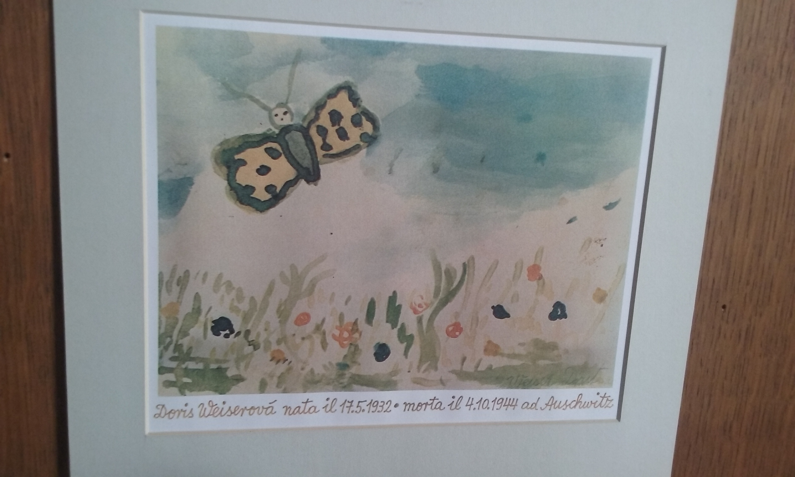 Dipiinto di un'alunna di Friedl nata il 17/05/1932 e morta ad Auschwitz il 04/10/1944. La fotografia è stata scattata a Pisa nel gennaio del 2016 in occasione di una mostra organizzata in onore di Friedl